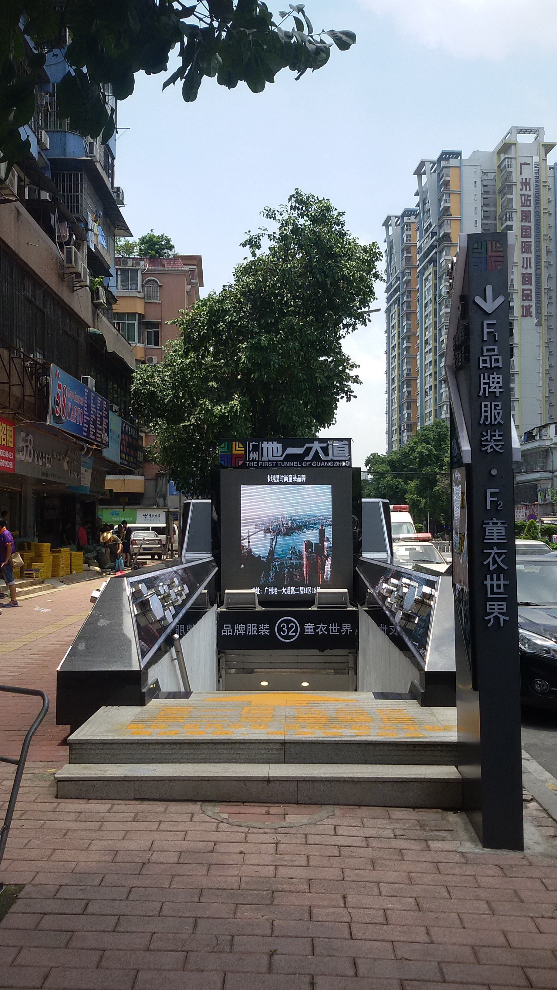 粵語: 廣州地一大道